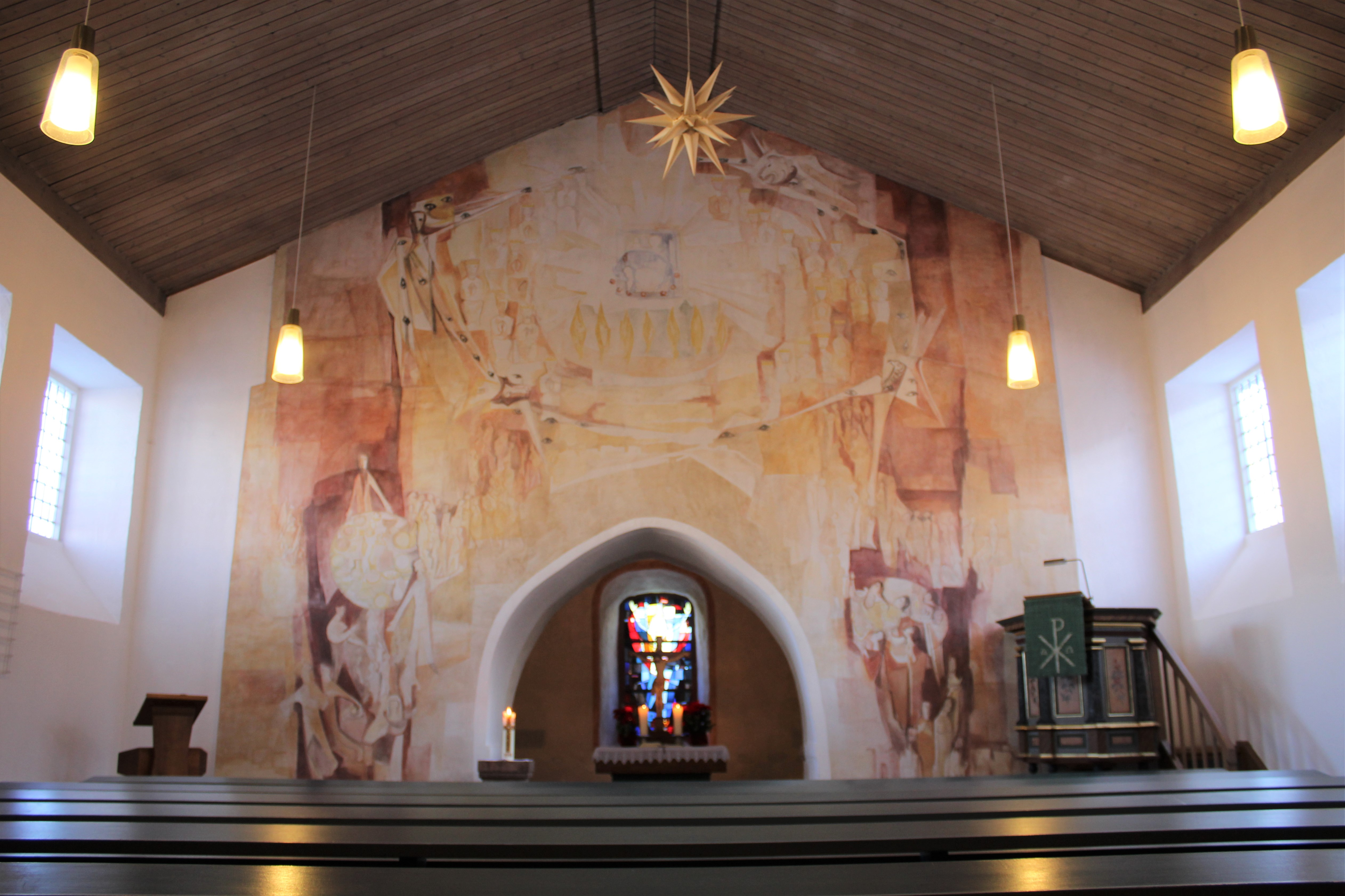 Evangelische Kirche Leidenhofen, Gemeinde Ebsdorfergrund, Landkreis Marburg-Biedenkopf, Hessen, Deutschland